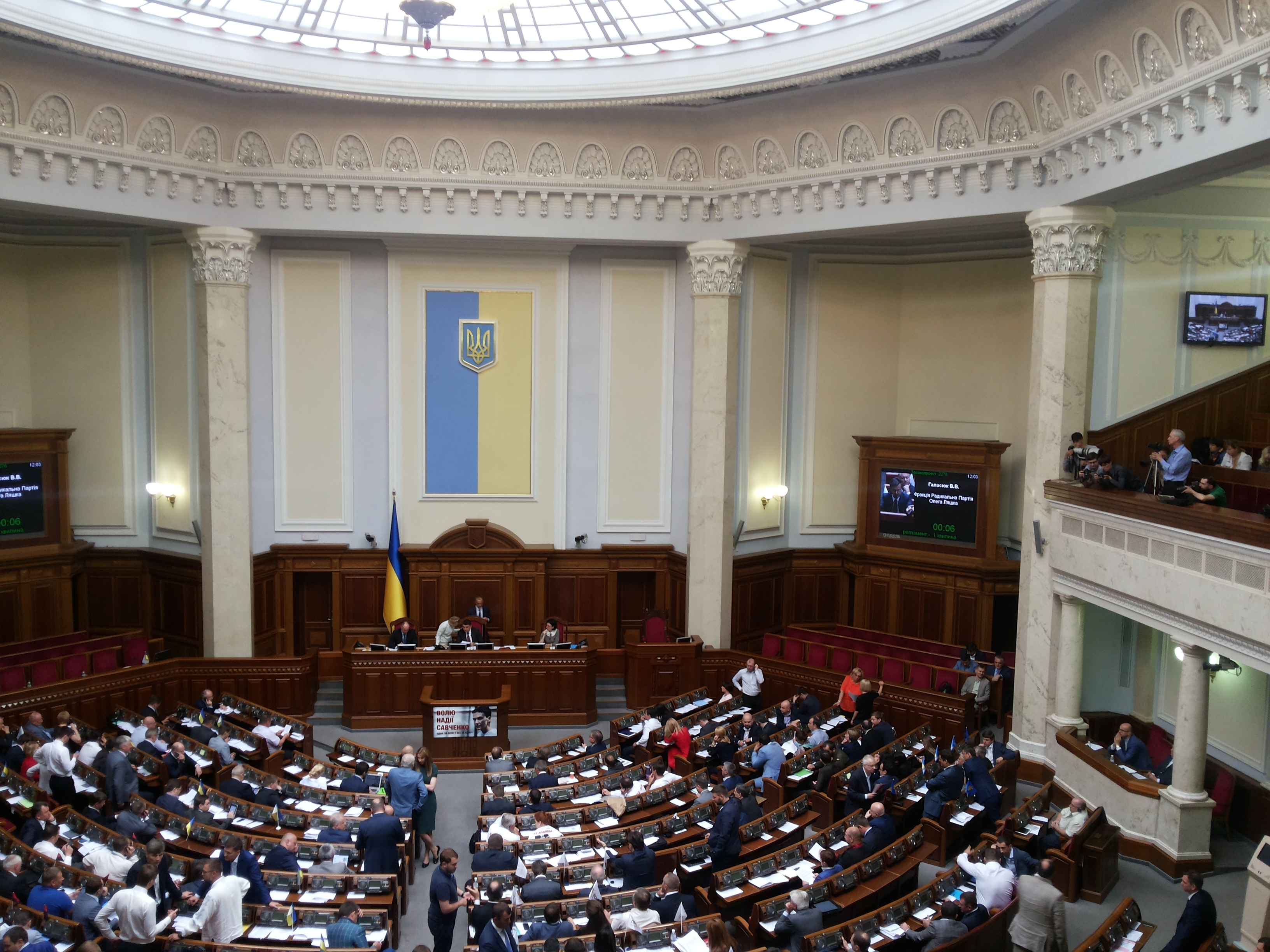 Виступ Віктора Галасюка у Верховній Раді України